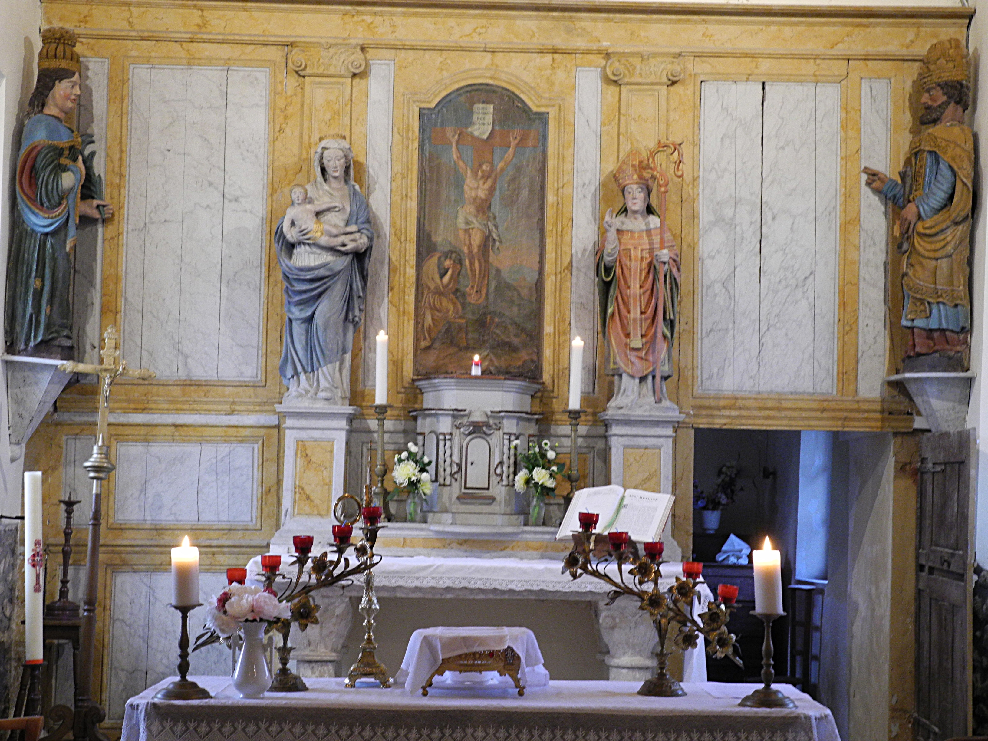 Chaignes (Eure, France), le chœur de l'église avec son retable et une table d'autel (à l'arrière de l'autele moderne) classée M.H..